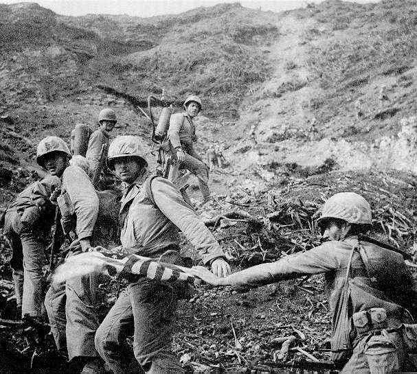 Subiendo el Monte Suribachi, en la isla de Iwo Jima para colocar la bandera norteamericana. See this source for details: Robertson, Breanne, ed. (2019). Investigating Iwo: The Flag Raisings in Myth, Memory, and Esprit de Corps (PDF). Quantico, Virginia: Marine Corps History Division. ISBN 978-0-16-095331-6. Photograph appears on page 158 (figure 9.4). Caption reads as follows: During the ascent, SSgt Louis Lowery asked that the flag be unfurled lest the patrol failed to make it to the top. PFC Manuel Panizo reaches for the flag being held by PFC John Schmitt. Behind Schmitt, in ascending order, are: Cpl Thomas Hermanek, Pvt Philip Ward (bent over), Pvt Robert Goode, and Cpl Charles Lindberg, the flamethrower operators.